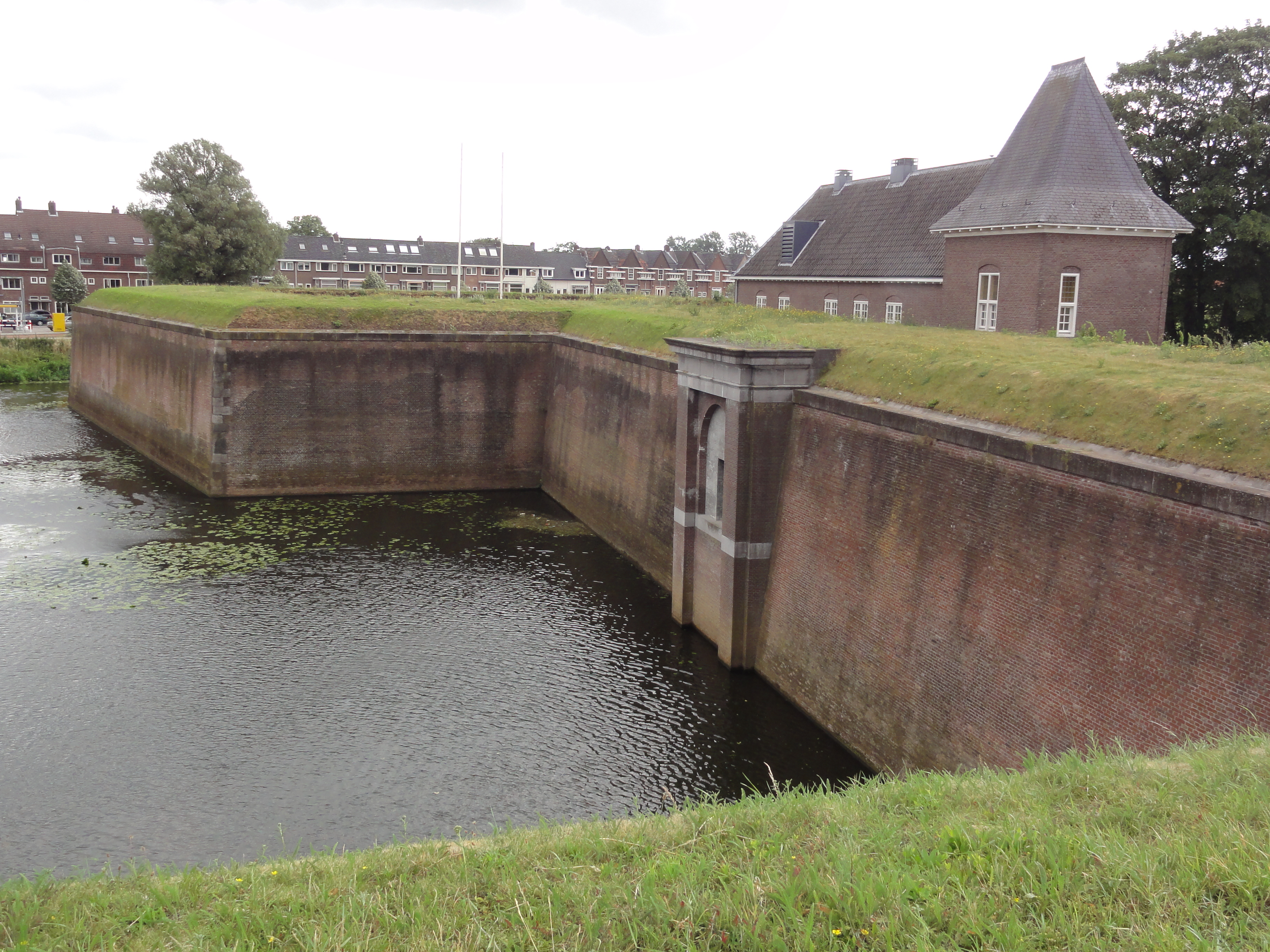 Citadel van 's-Hertogenbosch muur en gracht noordkant vanaf bastion gezien